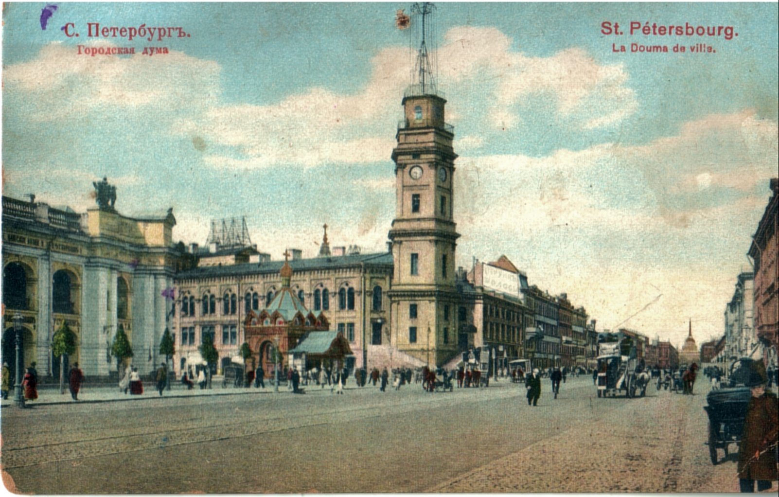 Невский проспект, вид на городскую Думу